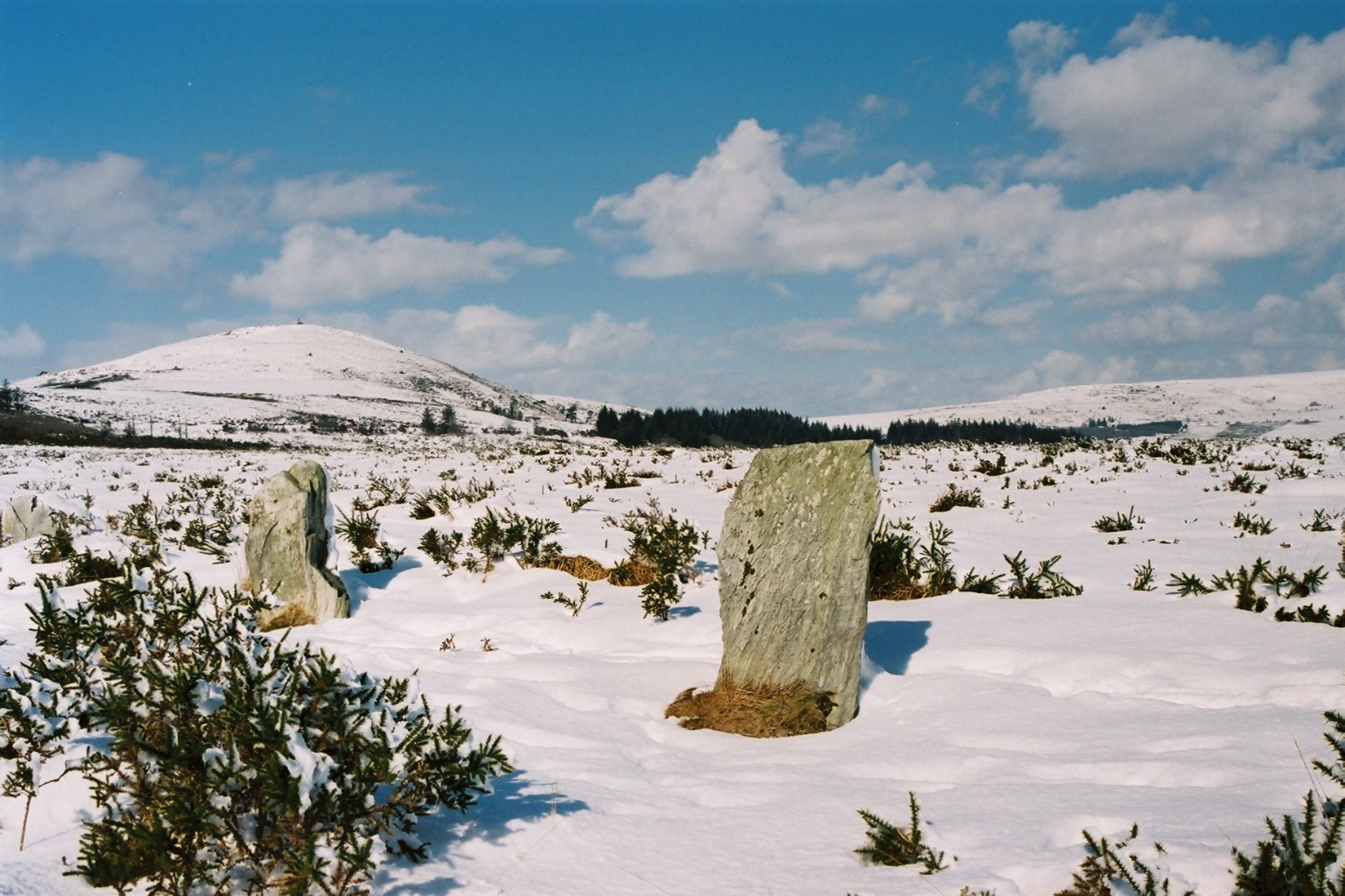 Les noces de pierre près du Mont St Michel dit "de Brasparts".